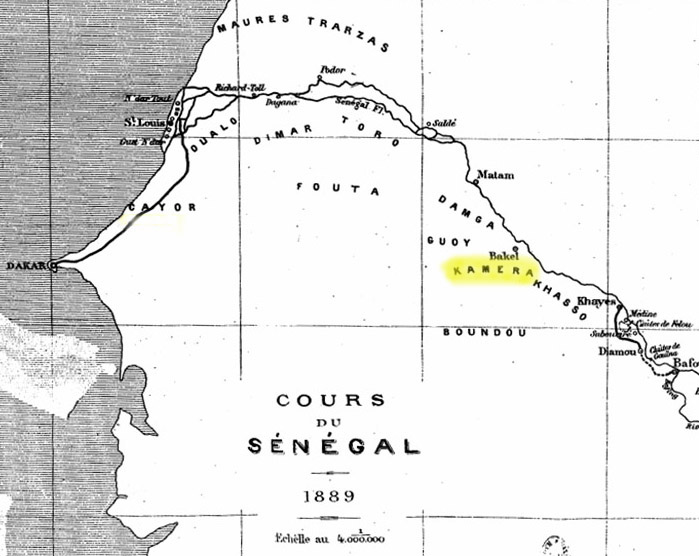 Localisation du Kaméra sur une carte du fleuve Sénégal (1889) dans Eugène Béchet, Cinq Ans de séjour au Soudan français, E. Plon, Nourrit, Paris, 1889, après la page 270